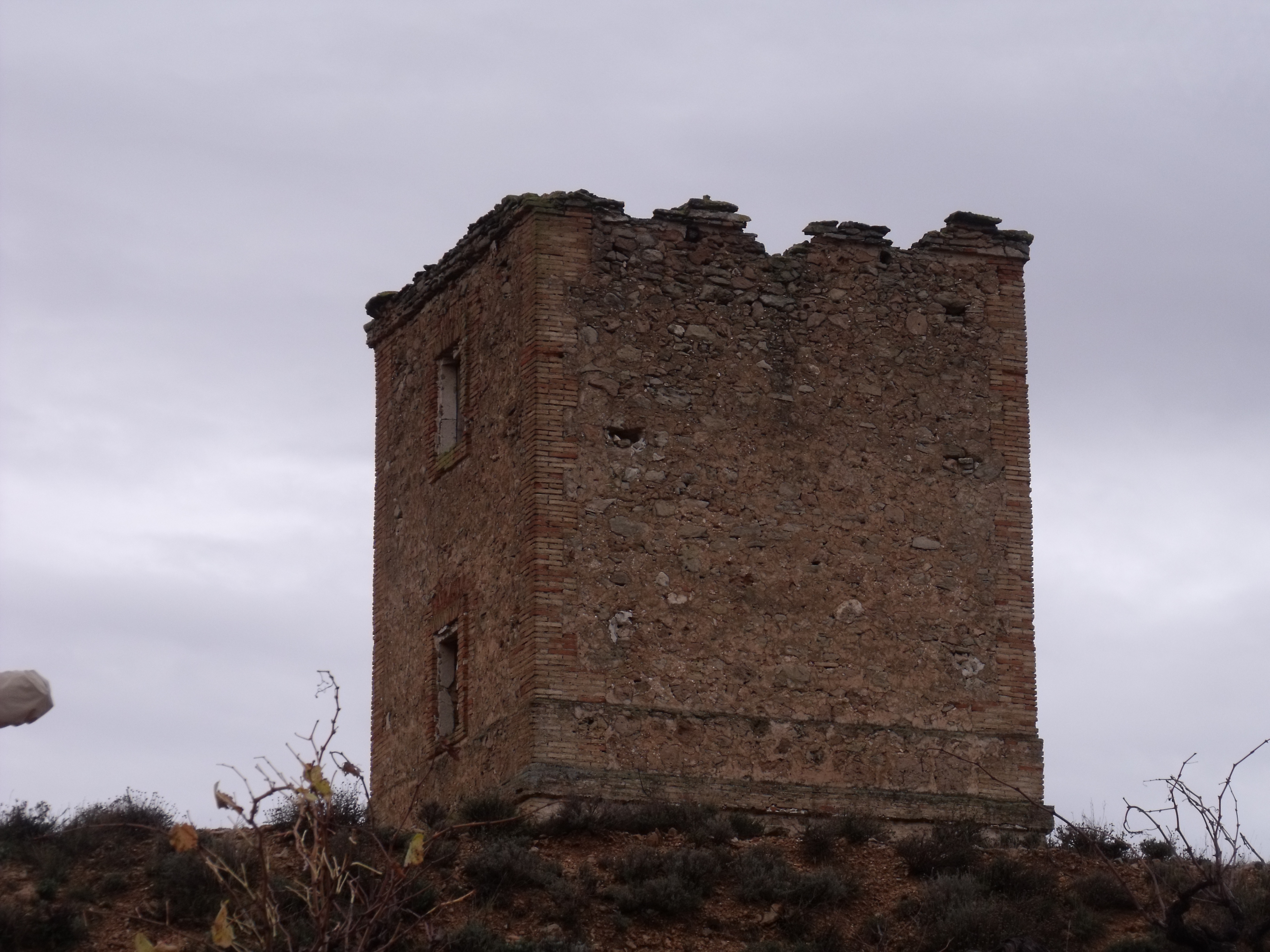 Vistas diversas de la torre de la Jedrea, en San Antonio de Requena